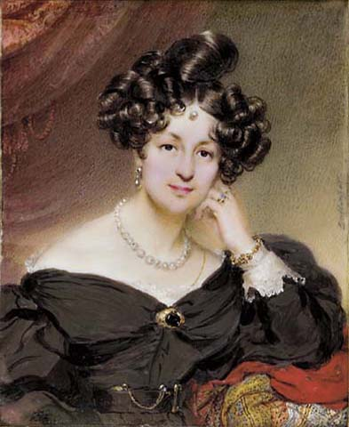 Countess Elisaveta Ksaverevna Vorontsova (1792-1880)label QS:Len,"Countess Elisaveta Ksaverevna Vorontsova (1792-1880)"